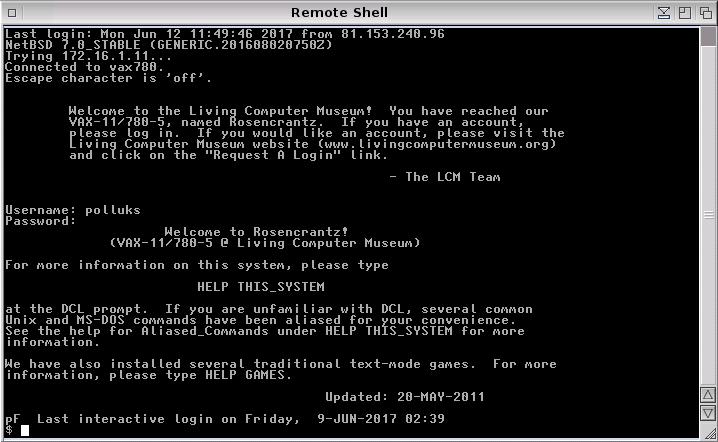 login